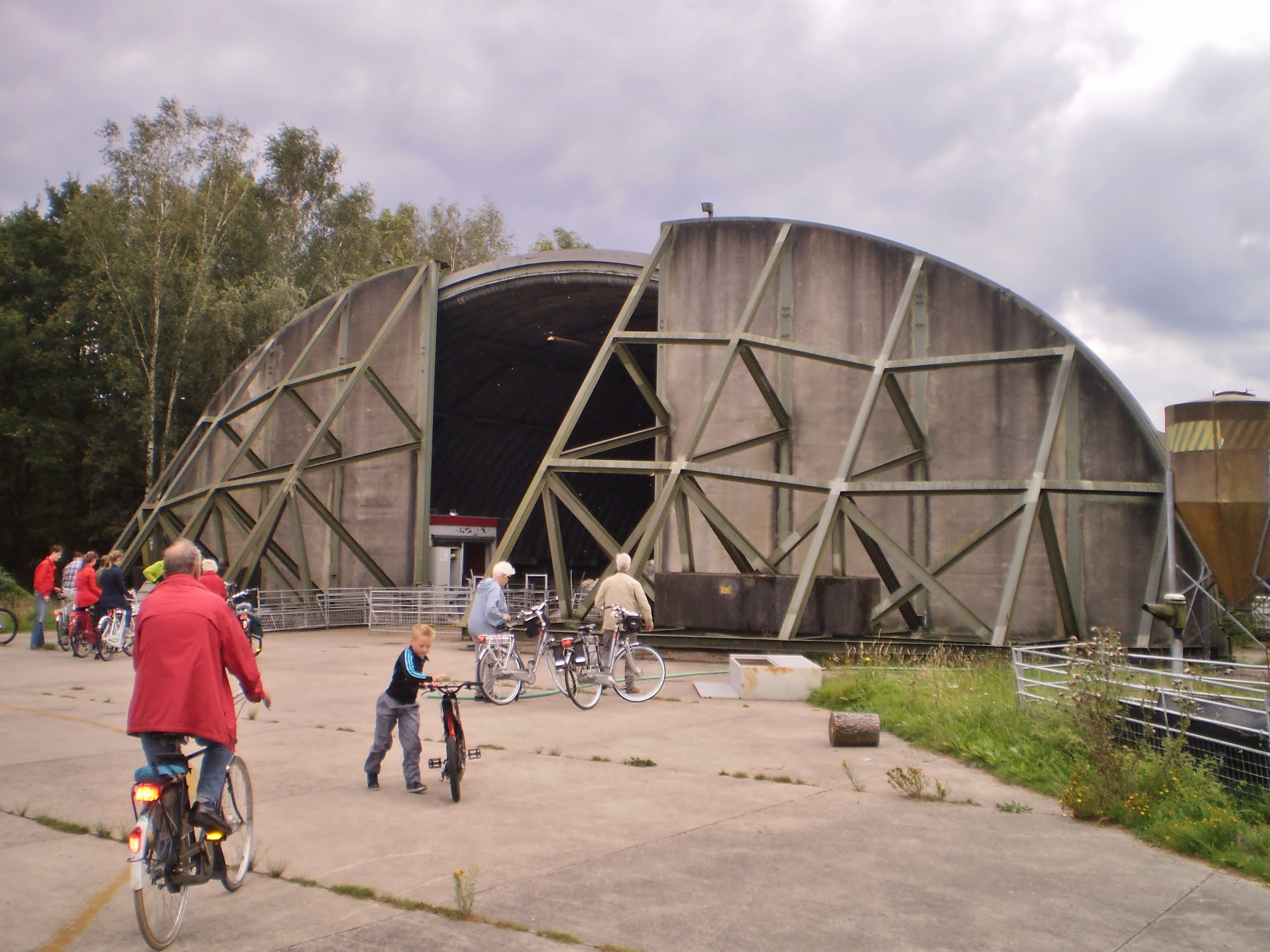 Hangar (Shelter 626) vliegbasis Soesterberg